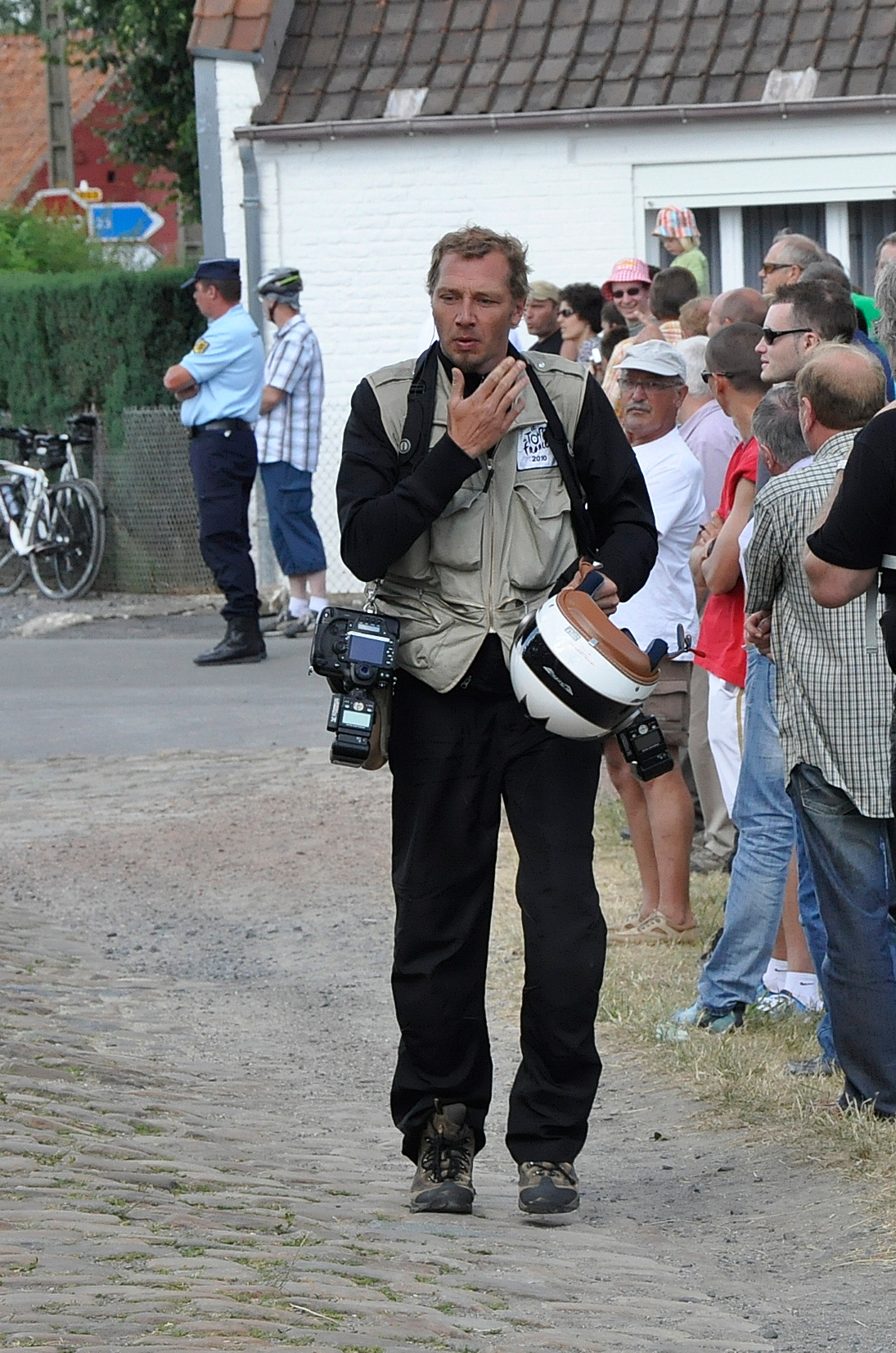 Een persfotograaf tijdens de Ronde van Frankrijk 2010 te Sars-et-Rosières, Frankrijk